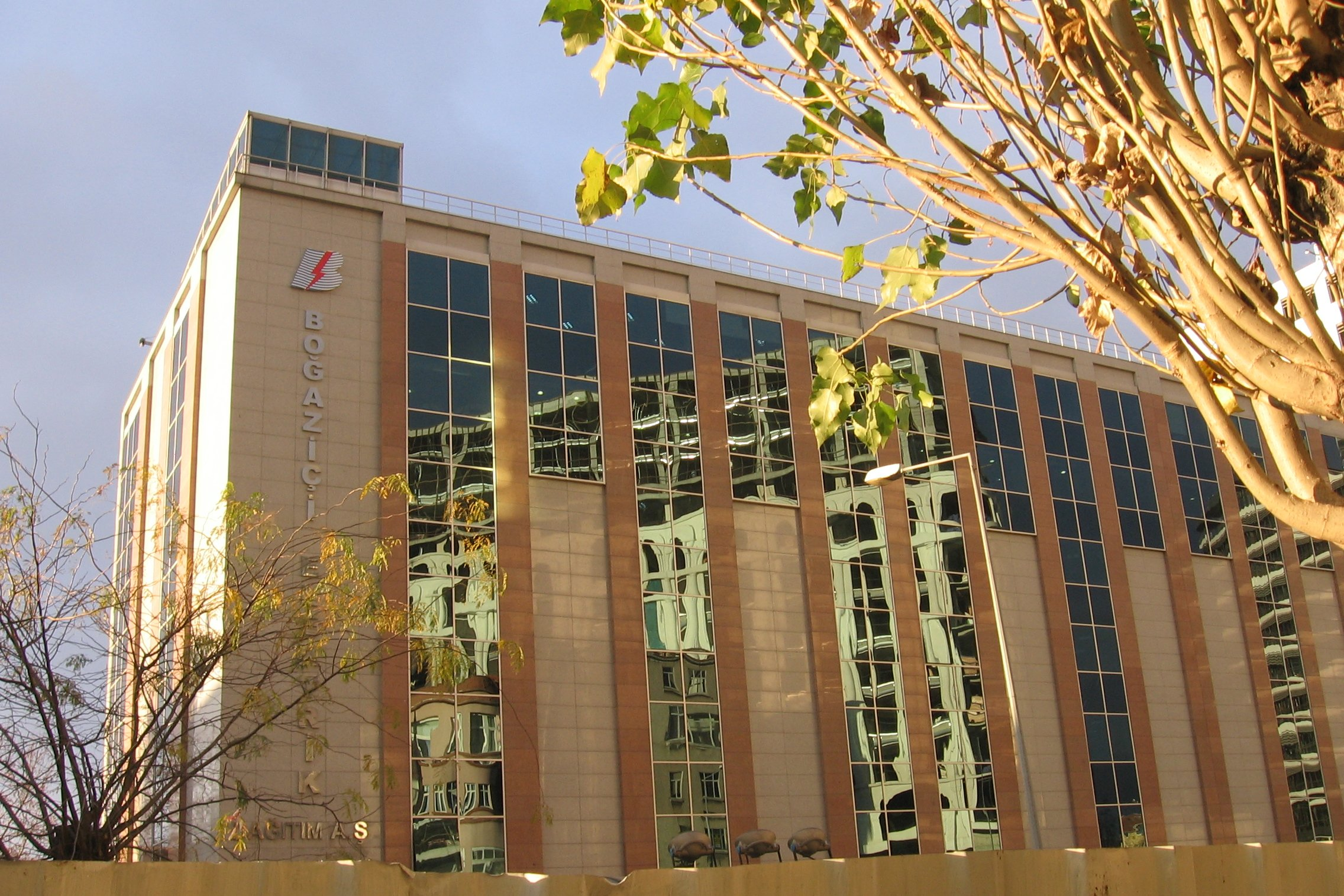 BEDAŞ gen. müd.